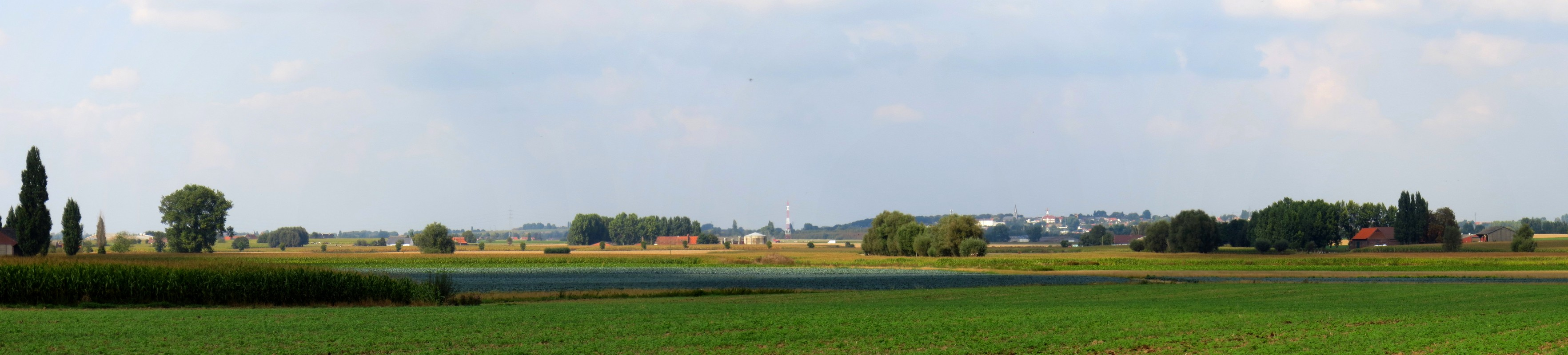 Bellegem